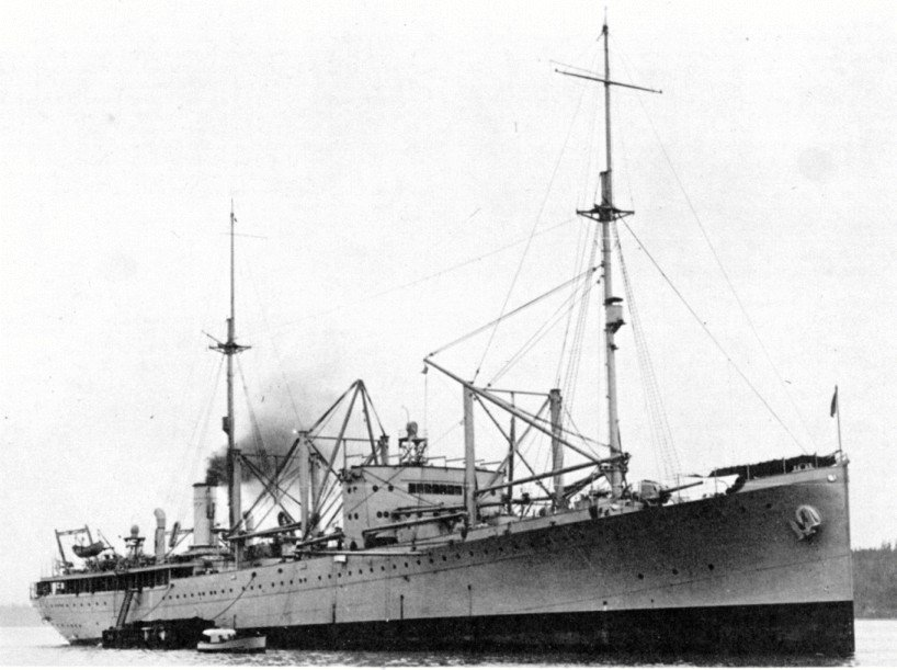 USS Pyro (AE-1)